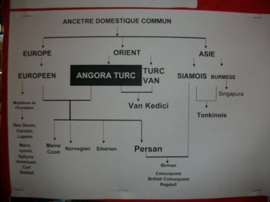 arbre phylogénétique